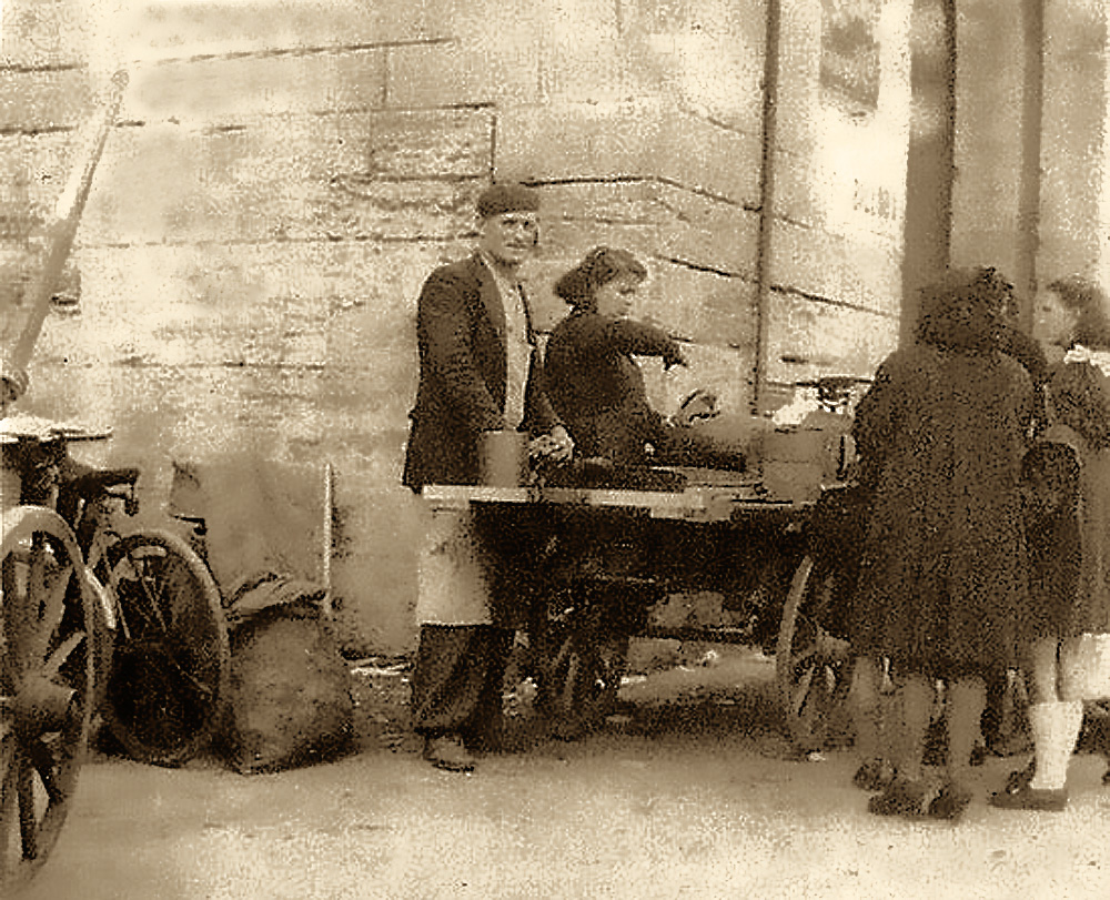 Marchand de marrons chauds à la Porte Saint-Michel lors de la Foire Saint-André d'Avignon en 1936